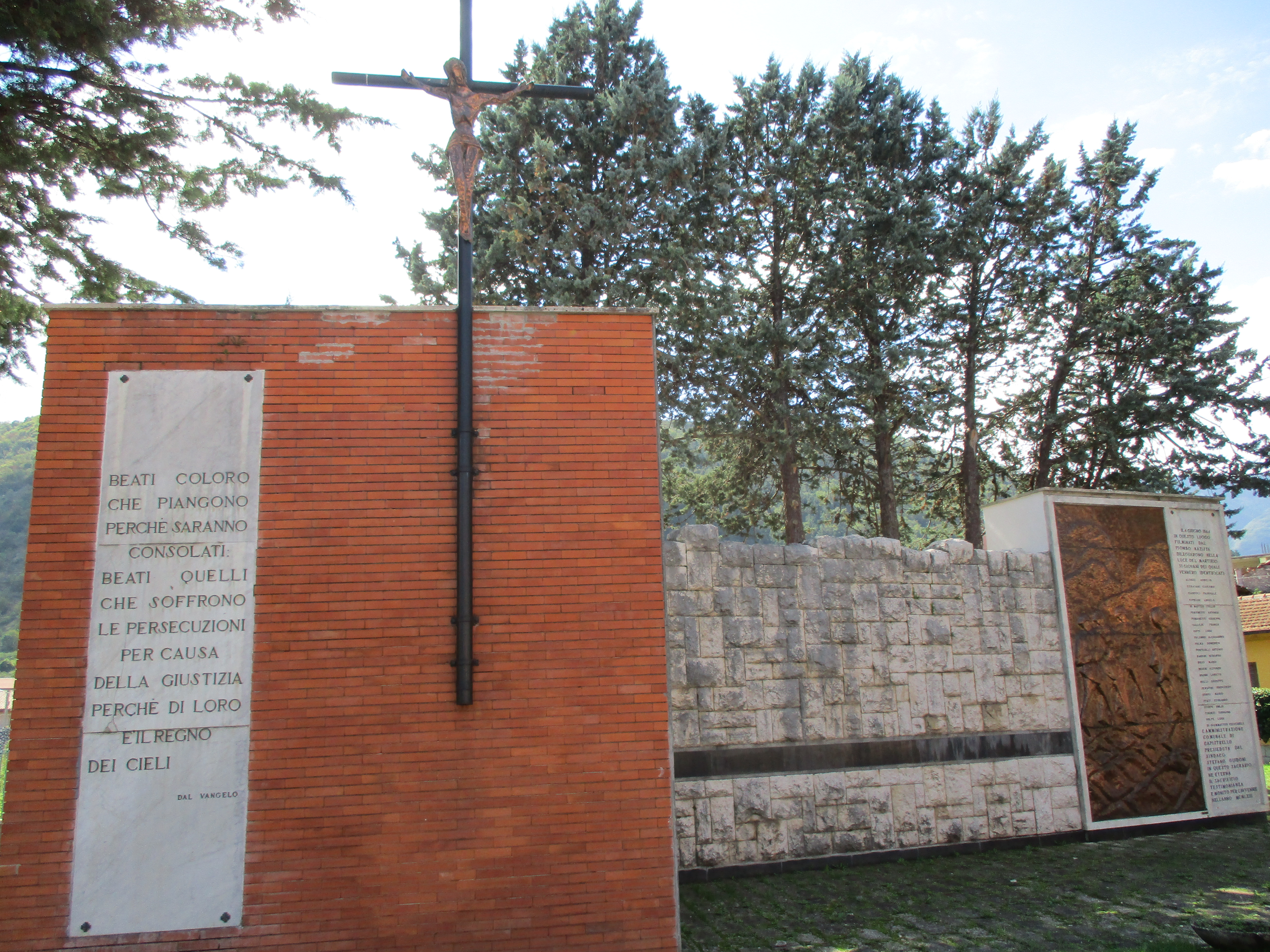 Sacrario dei 33 Martiri di Capistrello